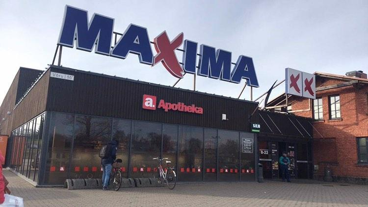 Sõbra Maxima Tartus 2020. aastal